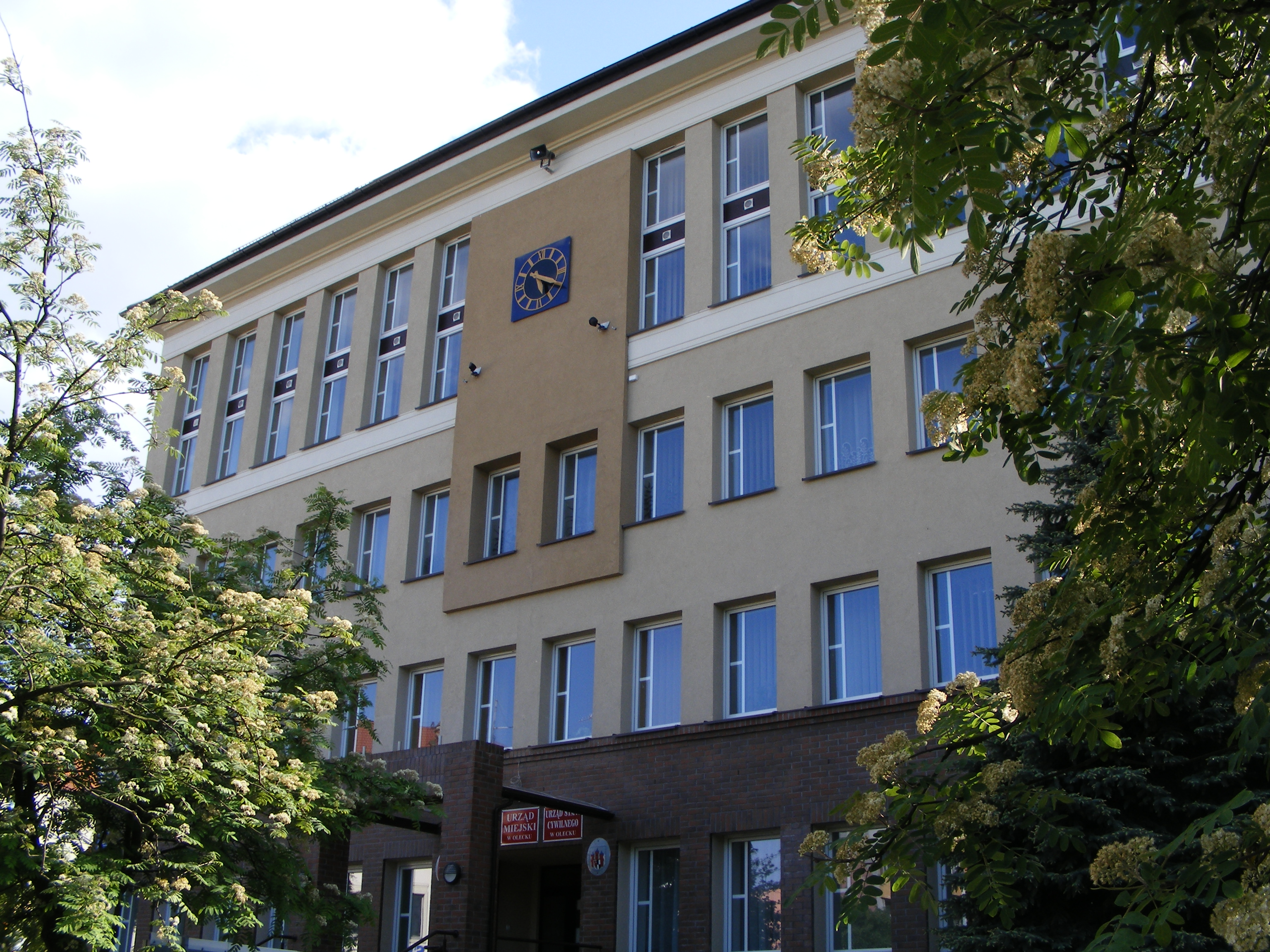 Olecko, Plac Wolności 3 - Urząd Miejski.